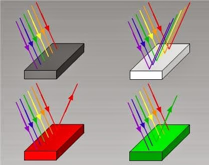 Objektu baten argiaren absortzioa, kolorea.